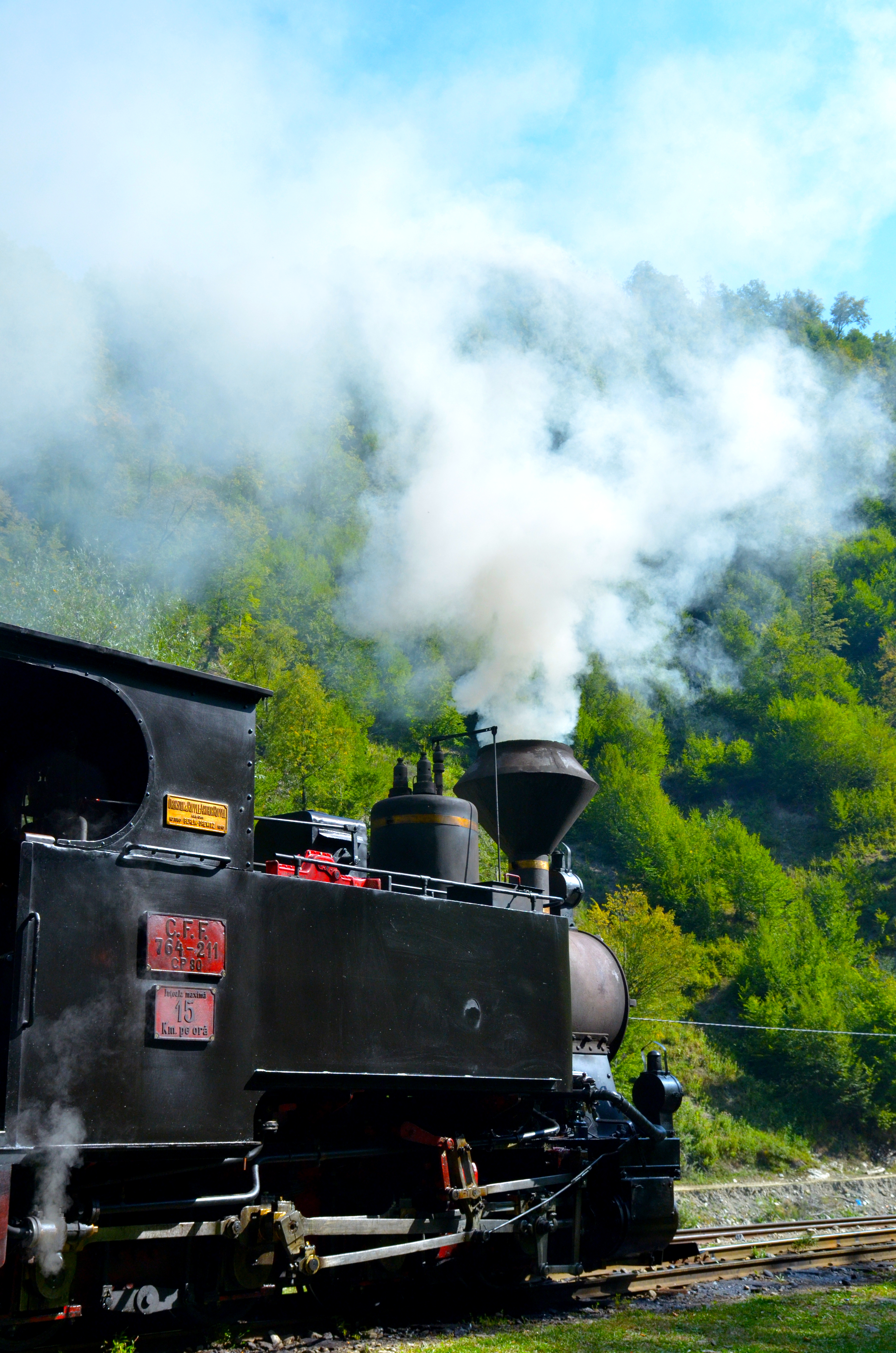 Mocanita cu Aburi de pe Valea Vaserului (Maramures, Romania)